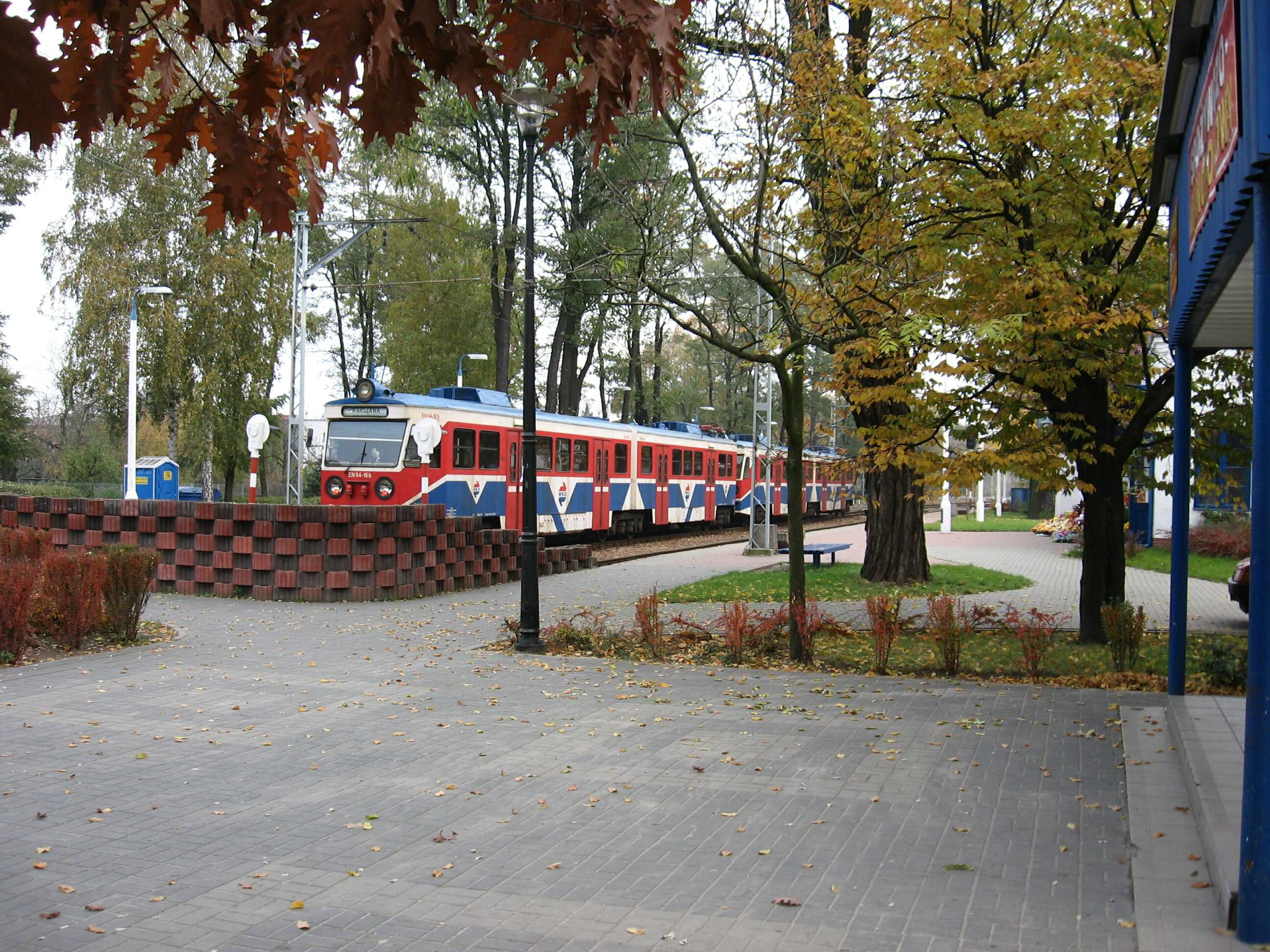 EN94 electric multiple unit at Grodzisk Mazowiecki Radońska